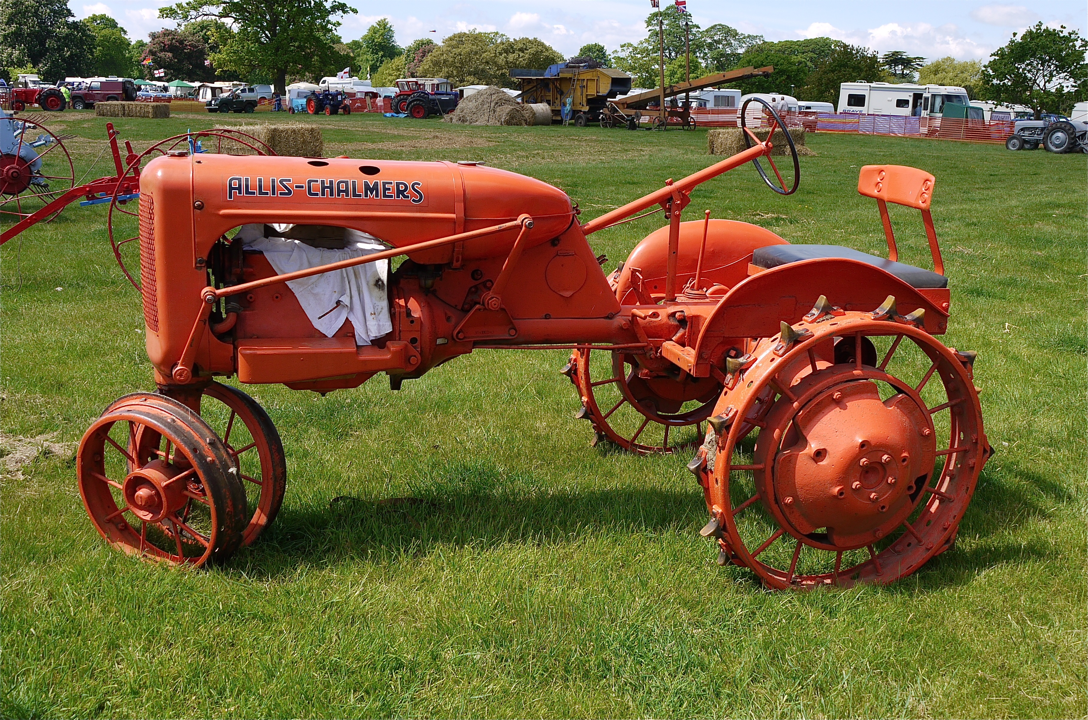 Panasonic G1 14-45 Lens